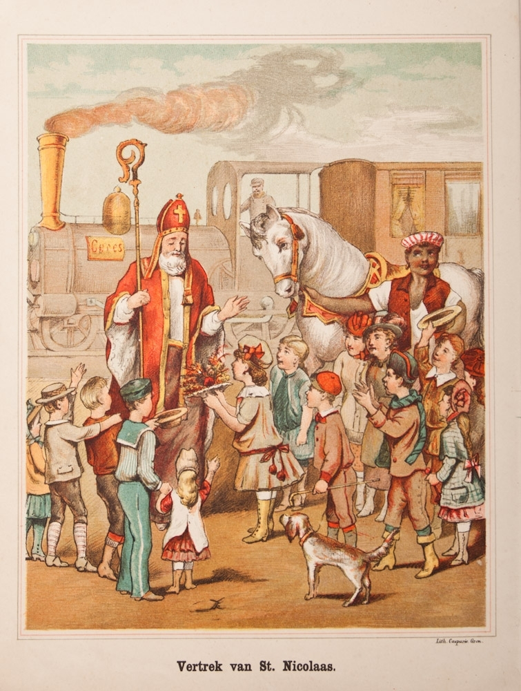 Vertrek van St. Nicolaas. Kleurenlitho uit het Groot St. Nicolaasboek naar tekeningen van Clara Bruins.